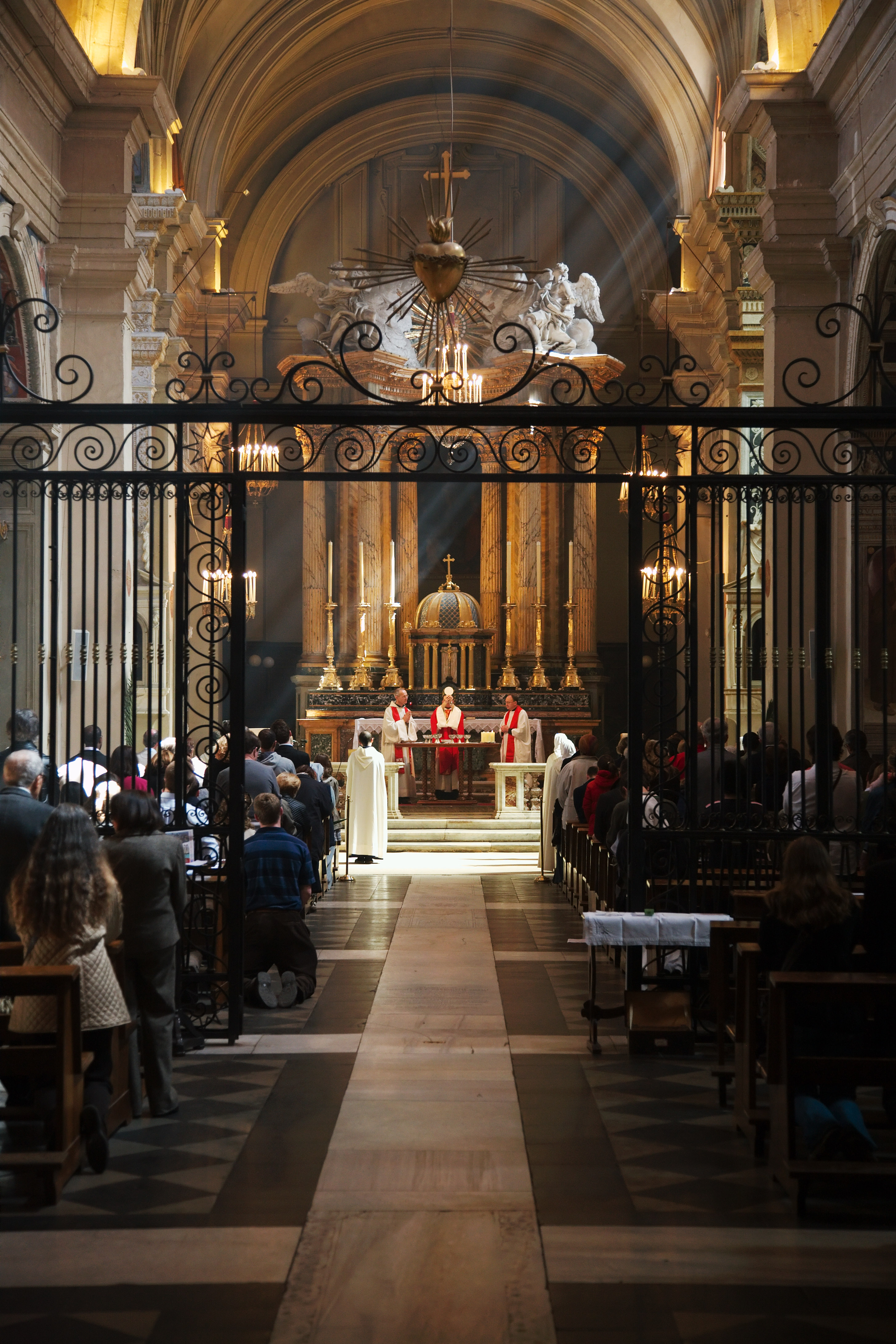 Santa Maria in Vallicella Trinità dei Monti during mass